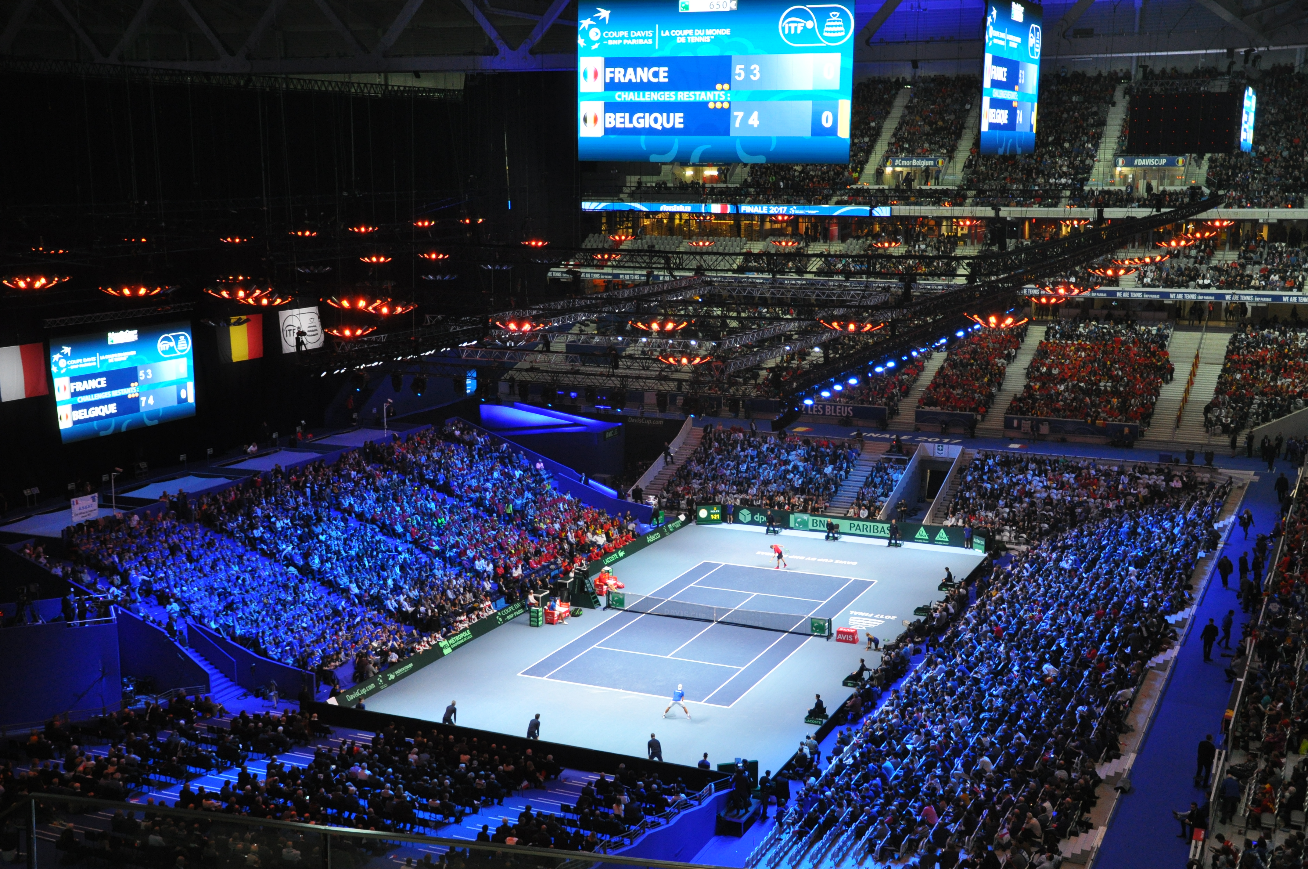 Finale de la Coupe Davis 2017, match Pouille-Goffin